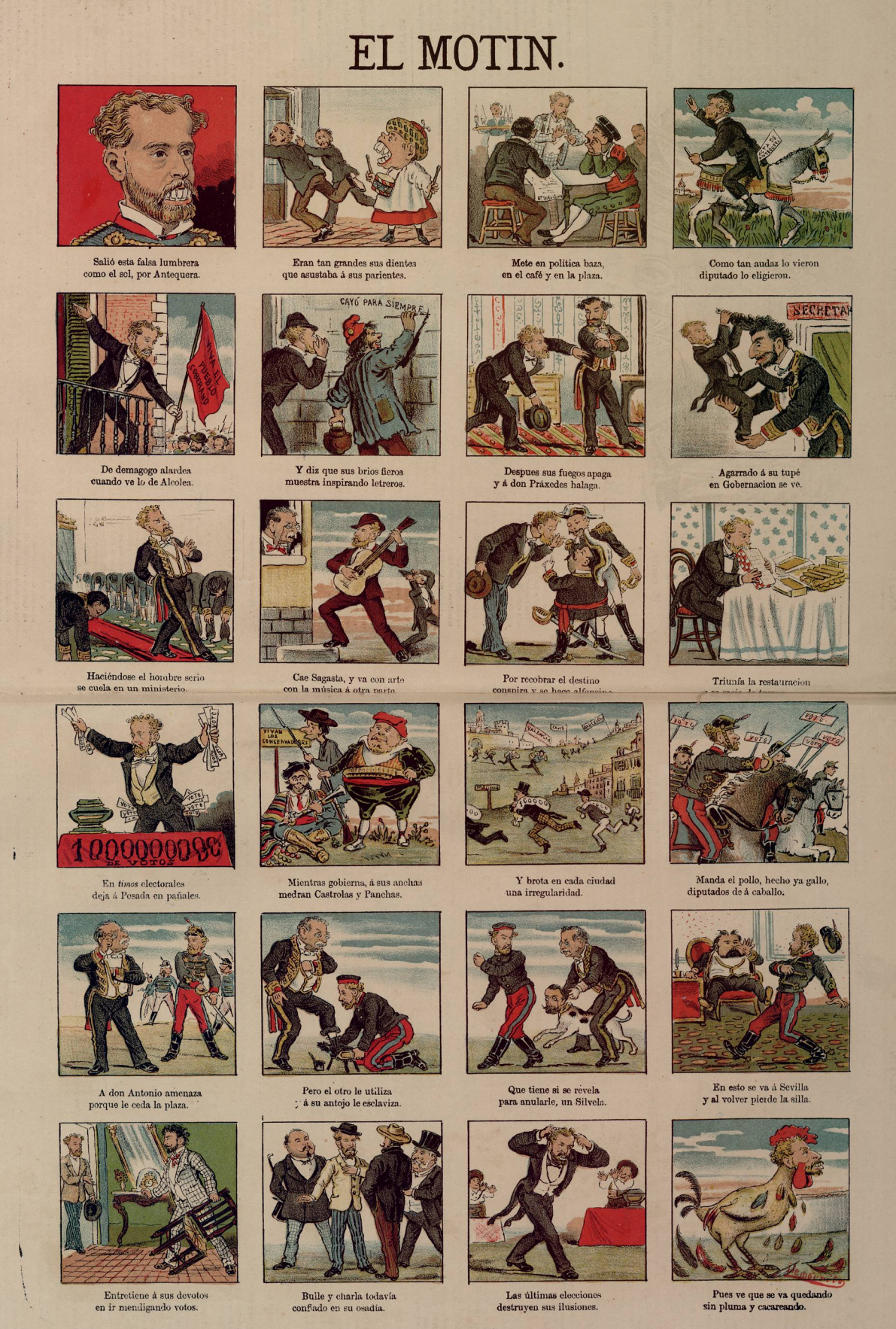 Romero Robledo, de Eduardo Sojo «Demócrito, publicada en la revista satírica española El Motín.